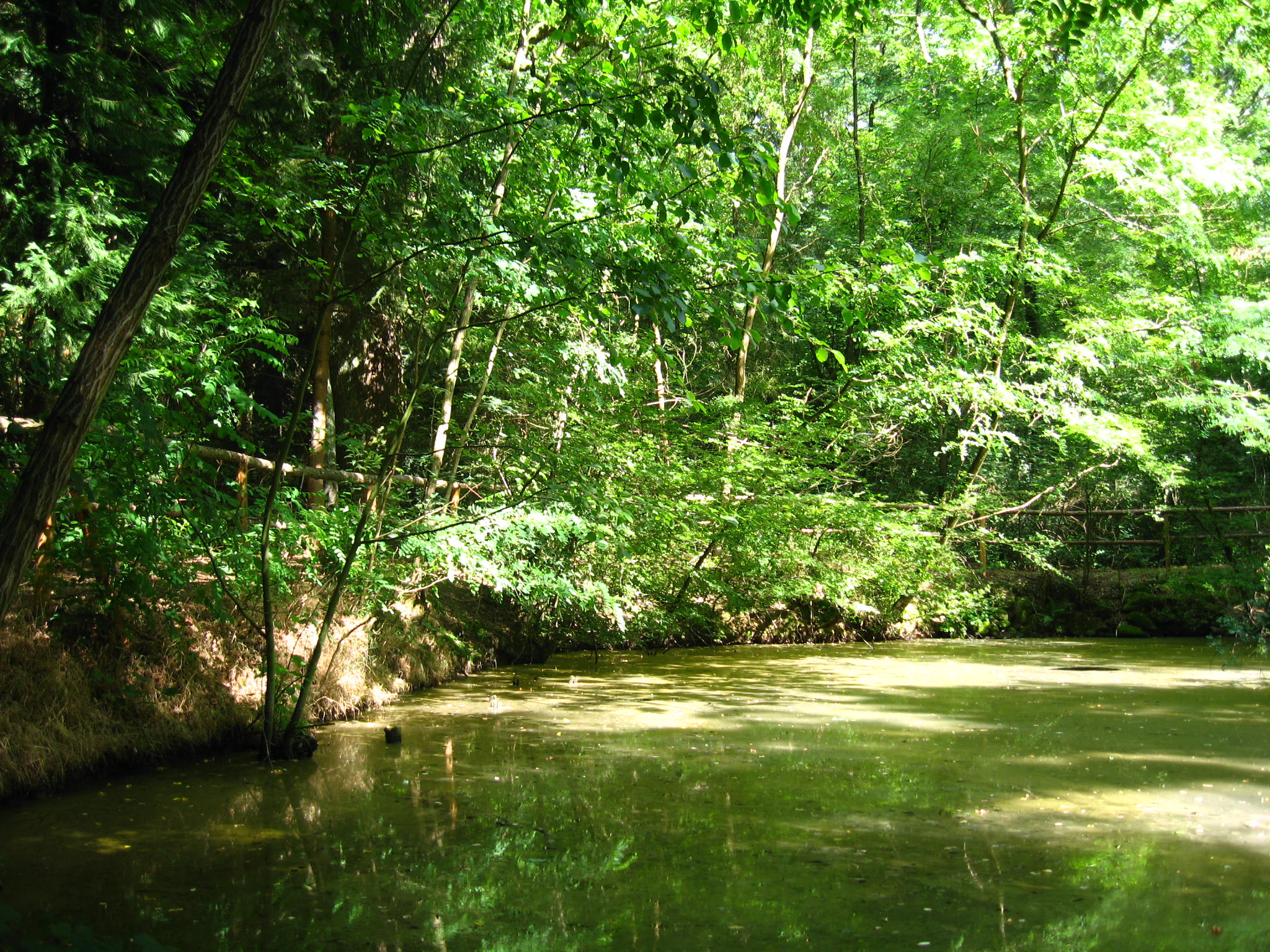 Teich im Akademischen Forstgarten Gießen